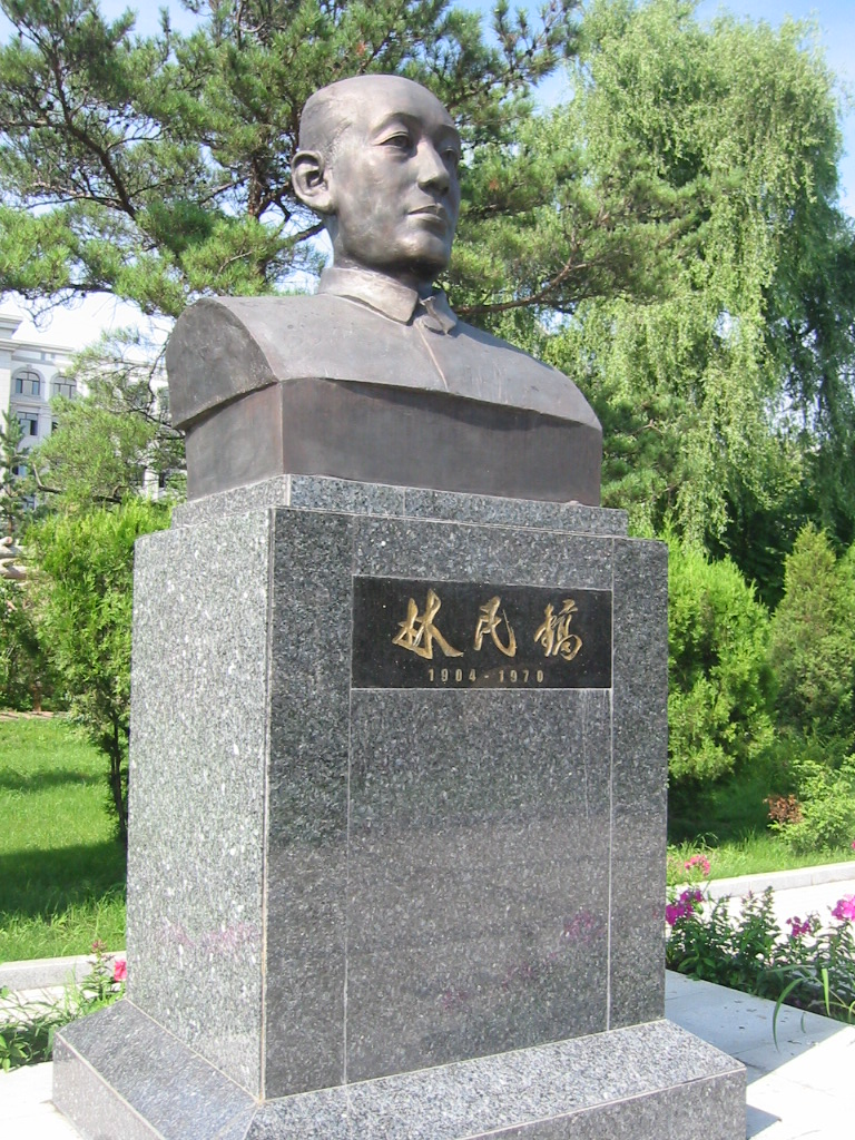 林民鎬像